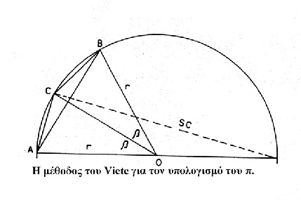 Μέθοδος υπολογισμού του π από τον Φρανσουά Βιέτ